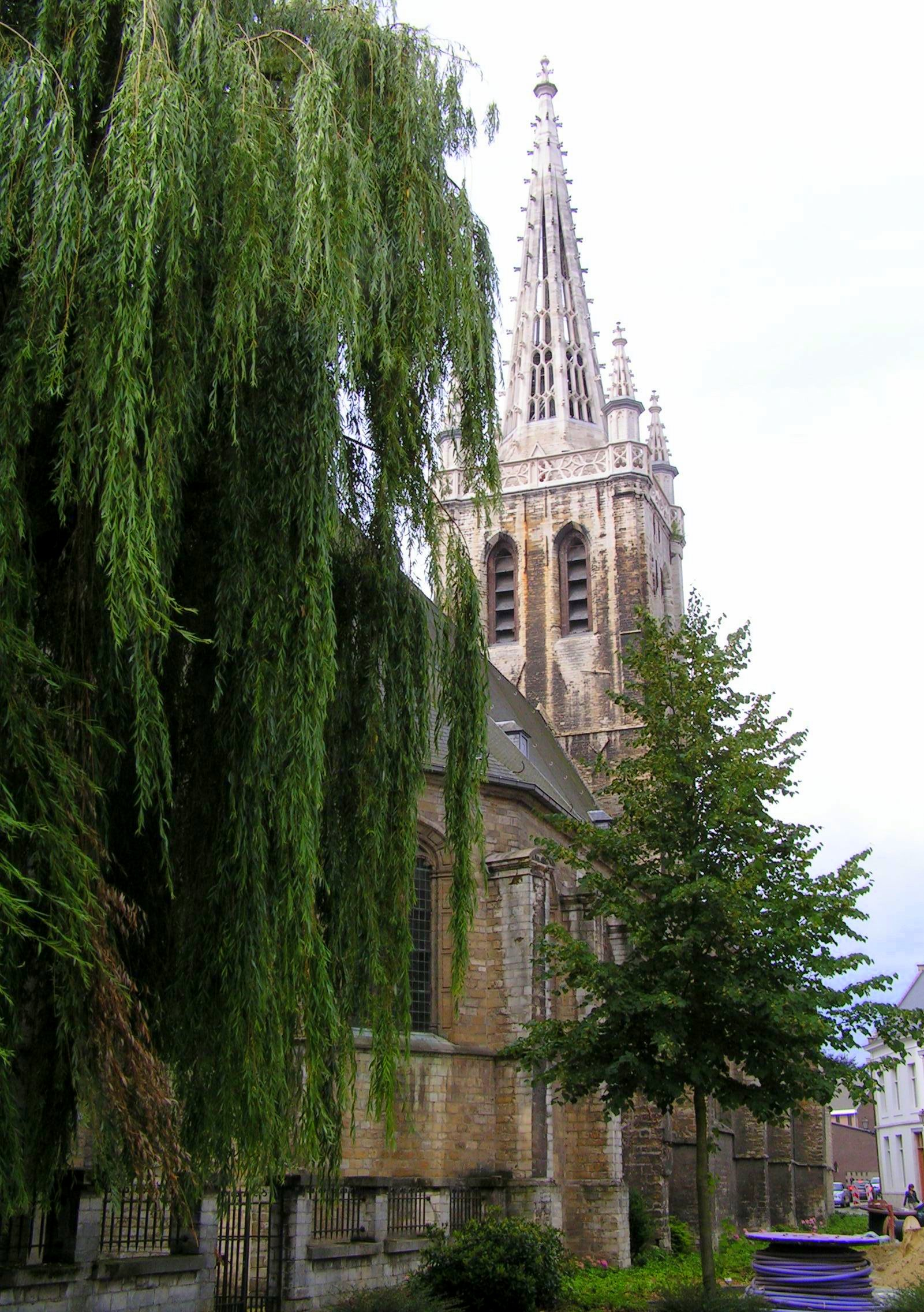 Sint Geertrui, Leuven, Belgium